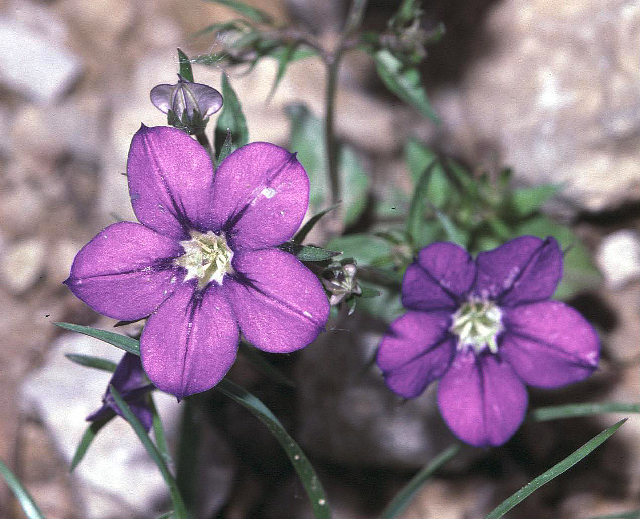 Legousia speculum-veneris, eigenes Foto von 1988, Unterfranken